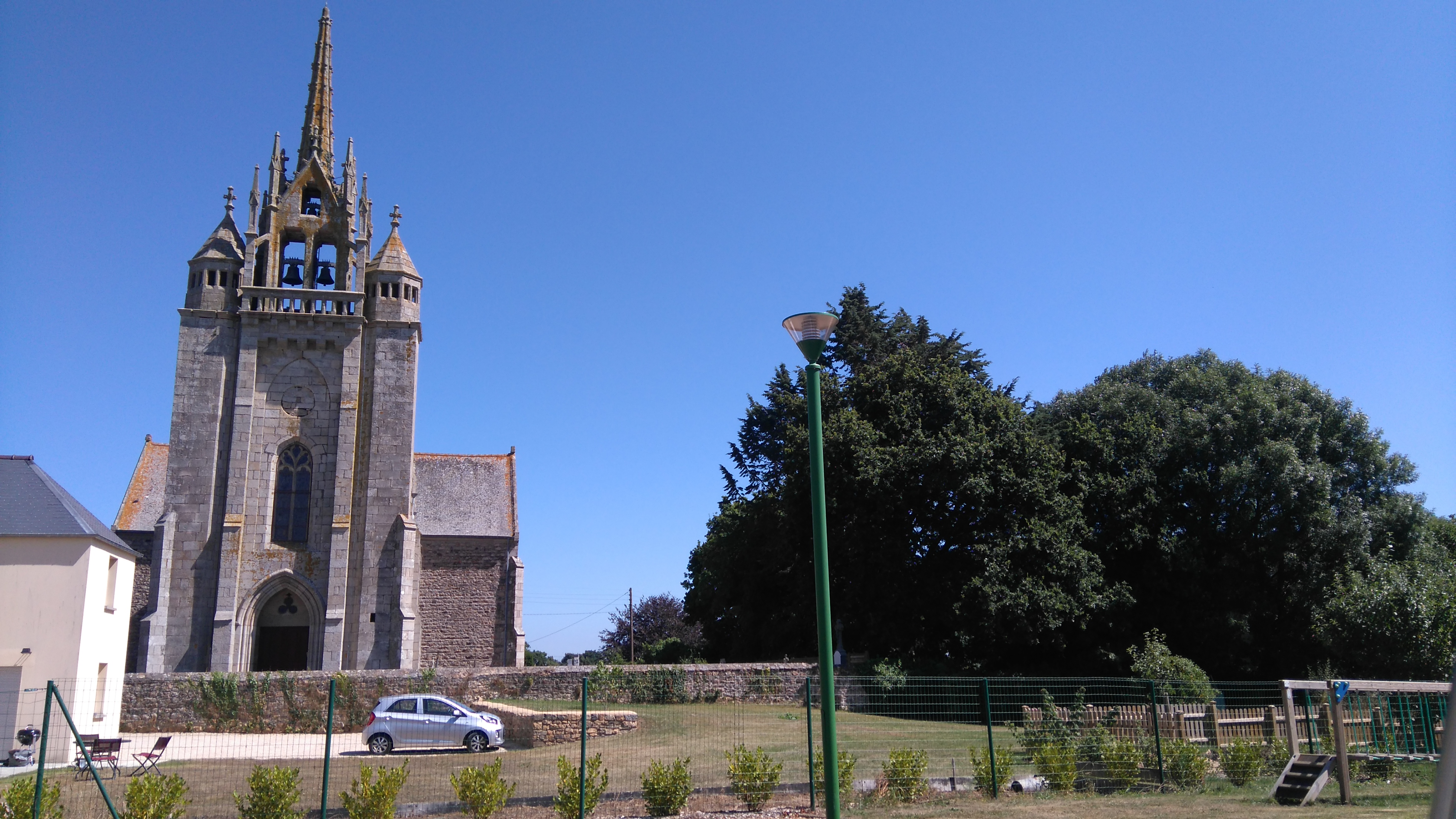 Eglise de Trévérec